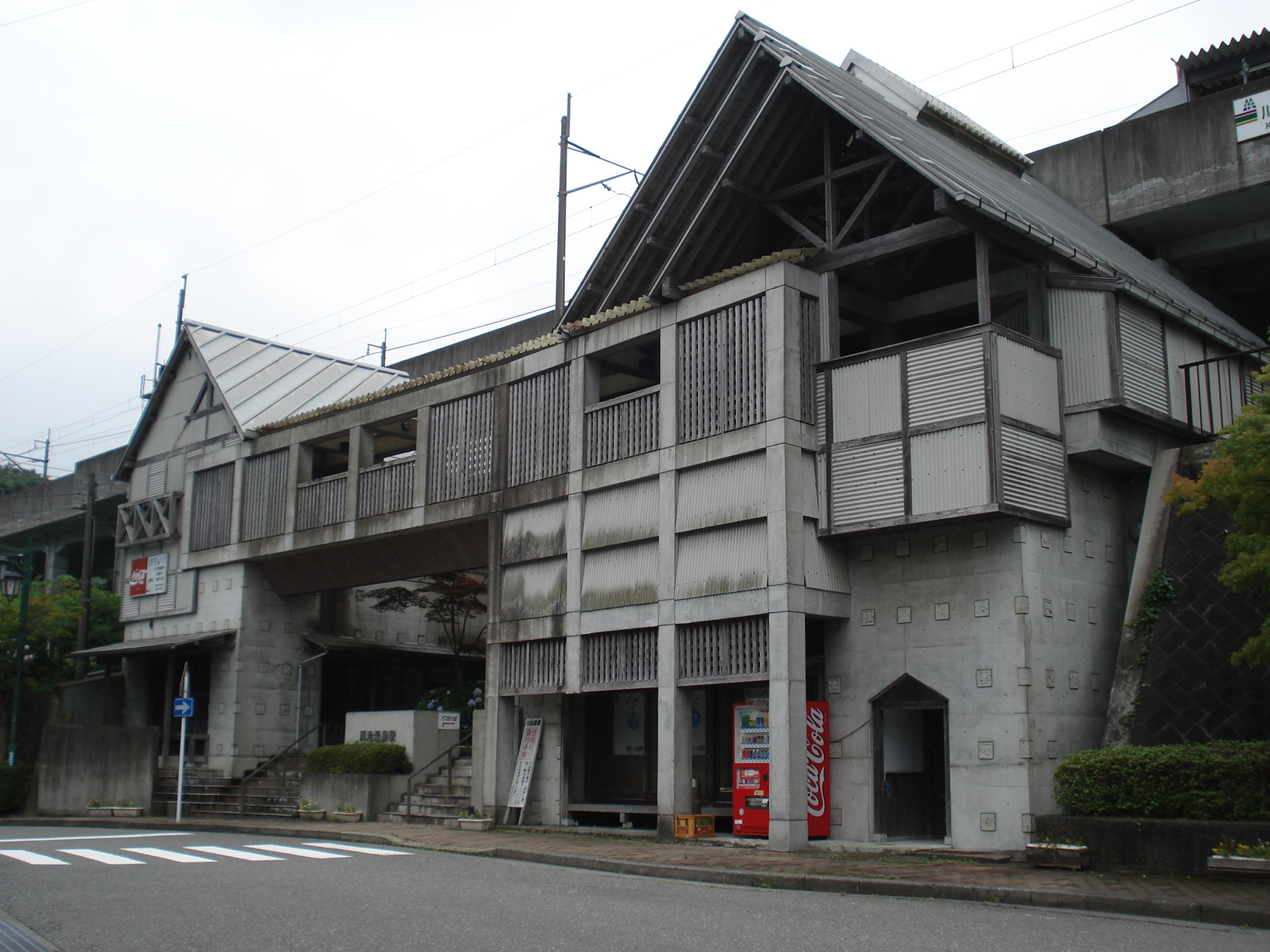 野岩鉄道会津鬼怒川線 川治温泉駅…栃木県日光市藤原字小網